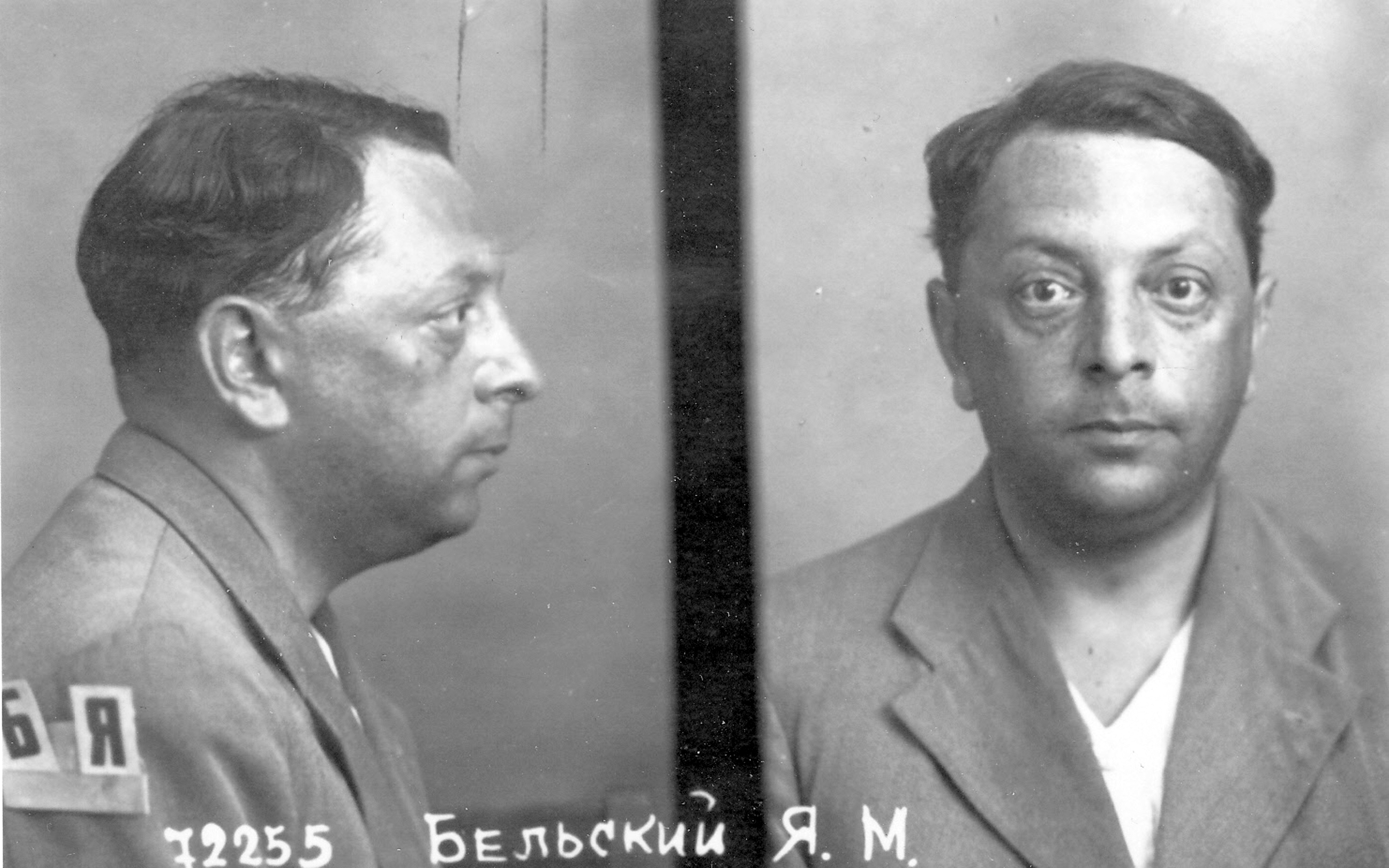 Я.М. Бельский-Биленкин. Фотография из следственного дела. 1937 год